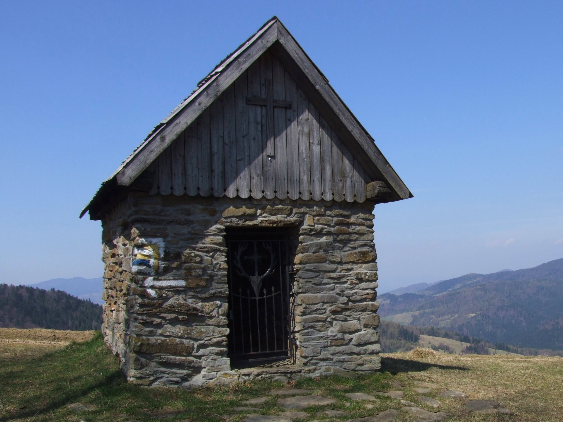 Kapliczka pod Jaworzynką (na grzbiecie Runek - Pusta Wielka w Paśmie Jaworzyny)